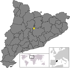 Localització de Cardona. Location of Cardona in Catalonia.